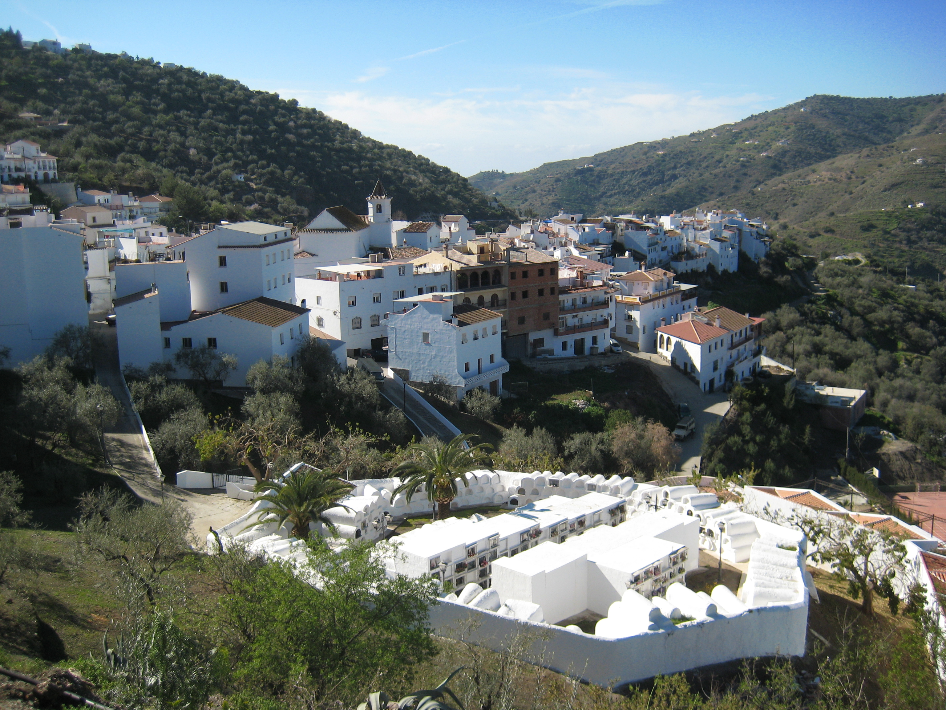 Vista de Sayalonga (Málaga, Andalucía, España). En primer plano, el cementerio redondo del pueblo.